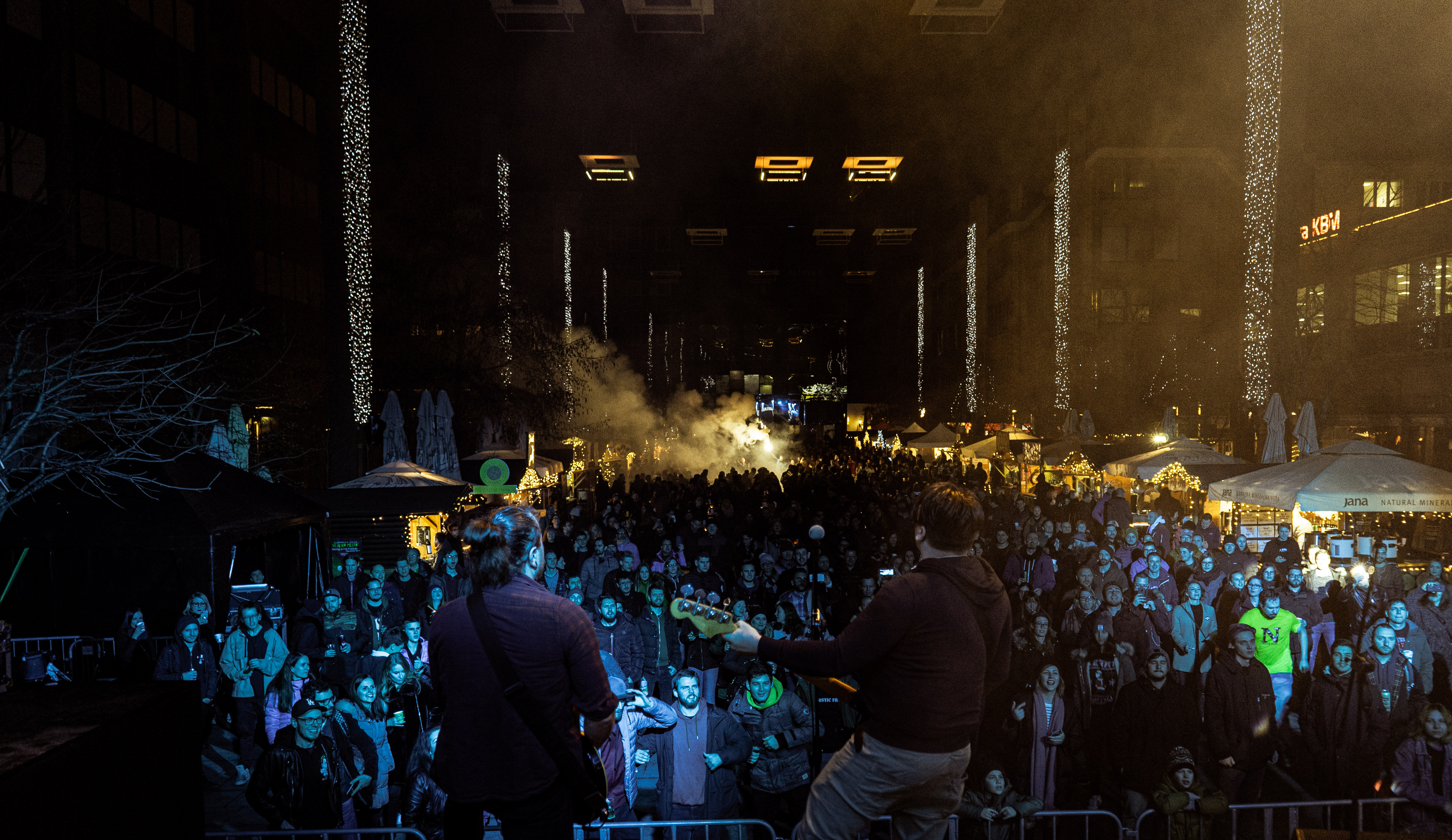 Alo!Stari na Trgu Leona Štuklja